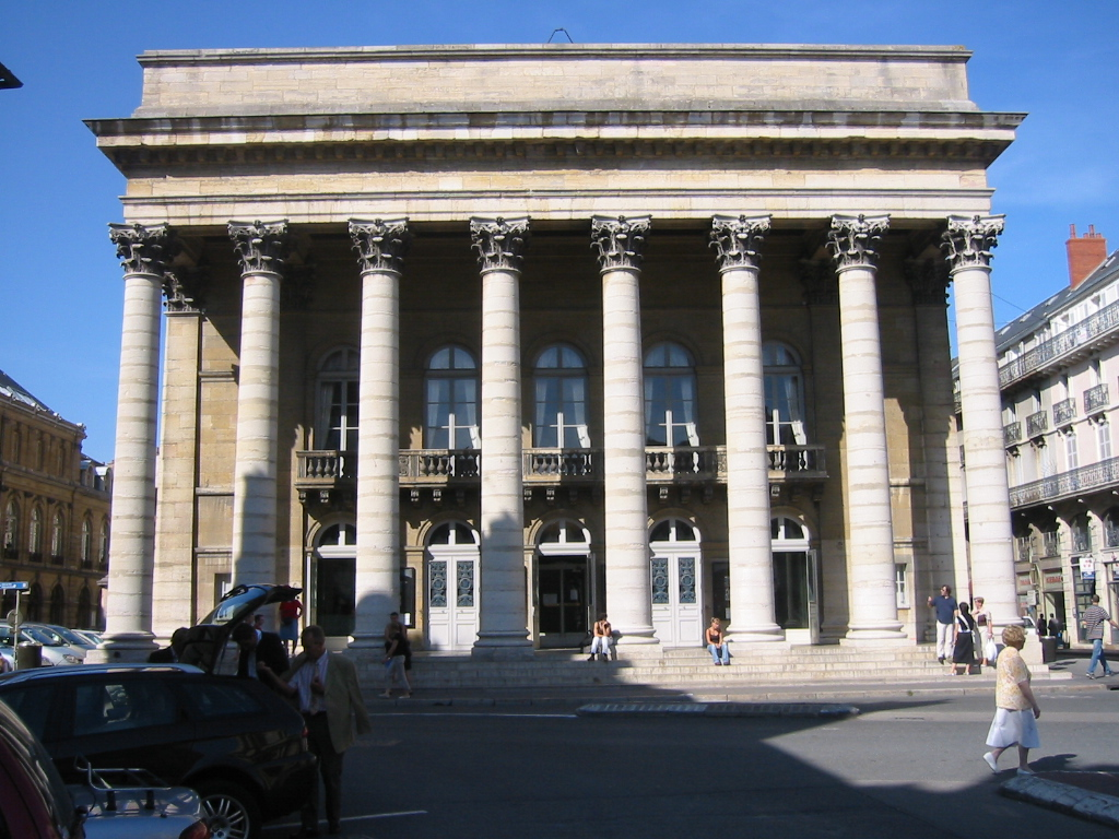 Théâtre de Dijon